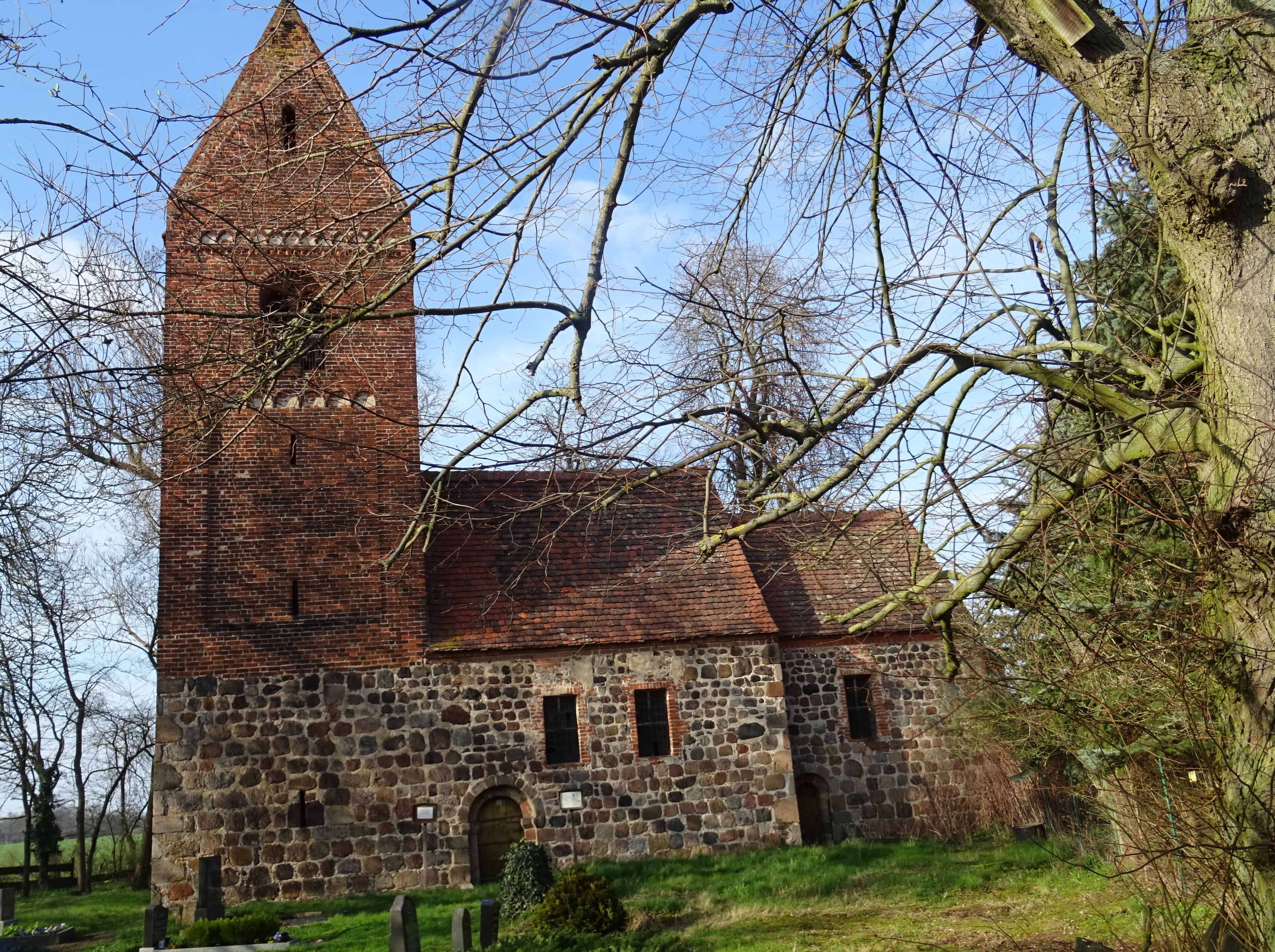 Dorfkirche Uchtenhagen, Stadt Osterburg, Blick von Süden